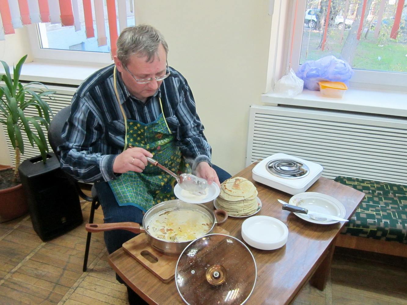 Юрась Пацюпа за прыгатаваннем мачанкі падчас прэзентацыі "Смачнай кнігі"